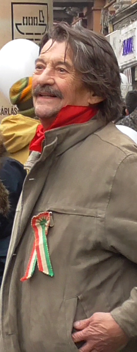 Galkó Balázs színművész 2018 március 15-én